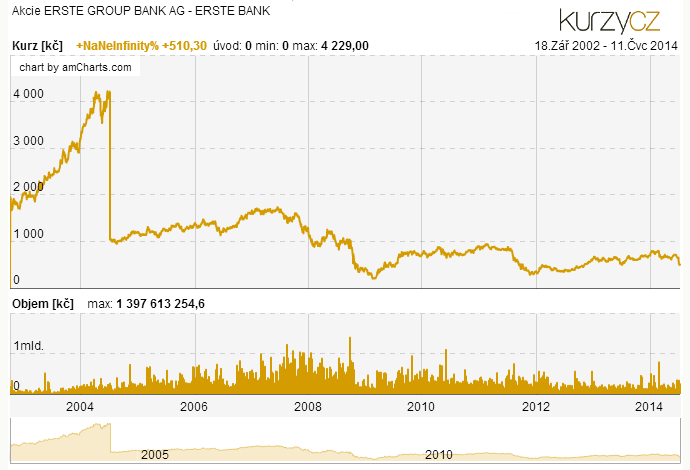 Aktie ERSTE GROUP BANK - Diagramm der Entwicklung der Prager Börse.